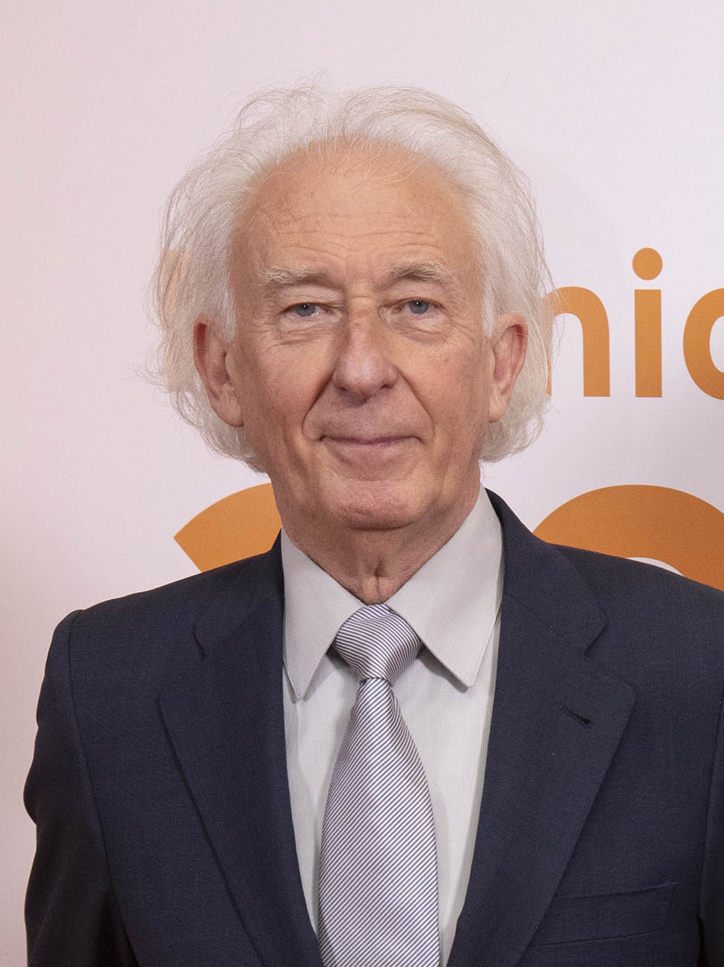 De izda. a dcha. Albert Boadella, premiado en la categoría 'Unidad de España' junto a Ignacio Arsuaga, presidente de .